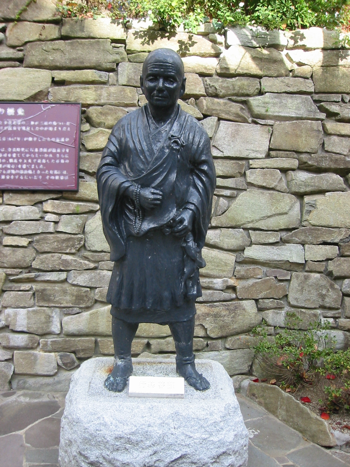 行基菩薩 (有馬にて)